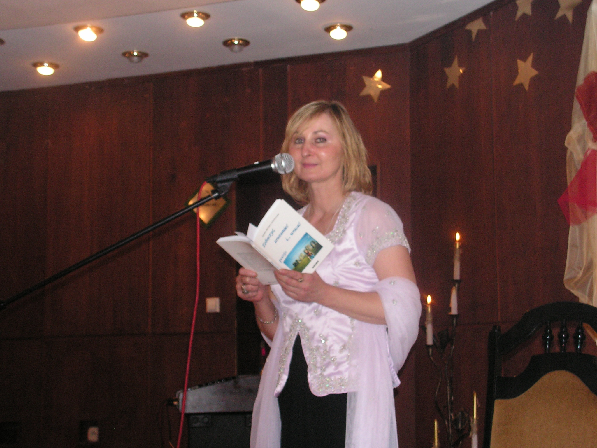 Wieczorek autorski